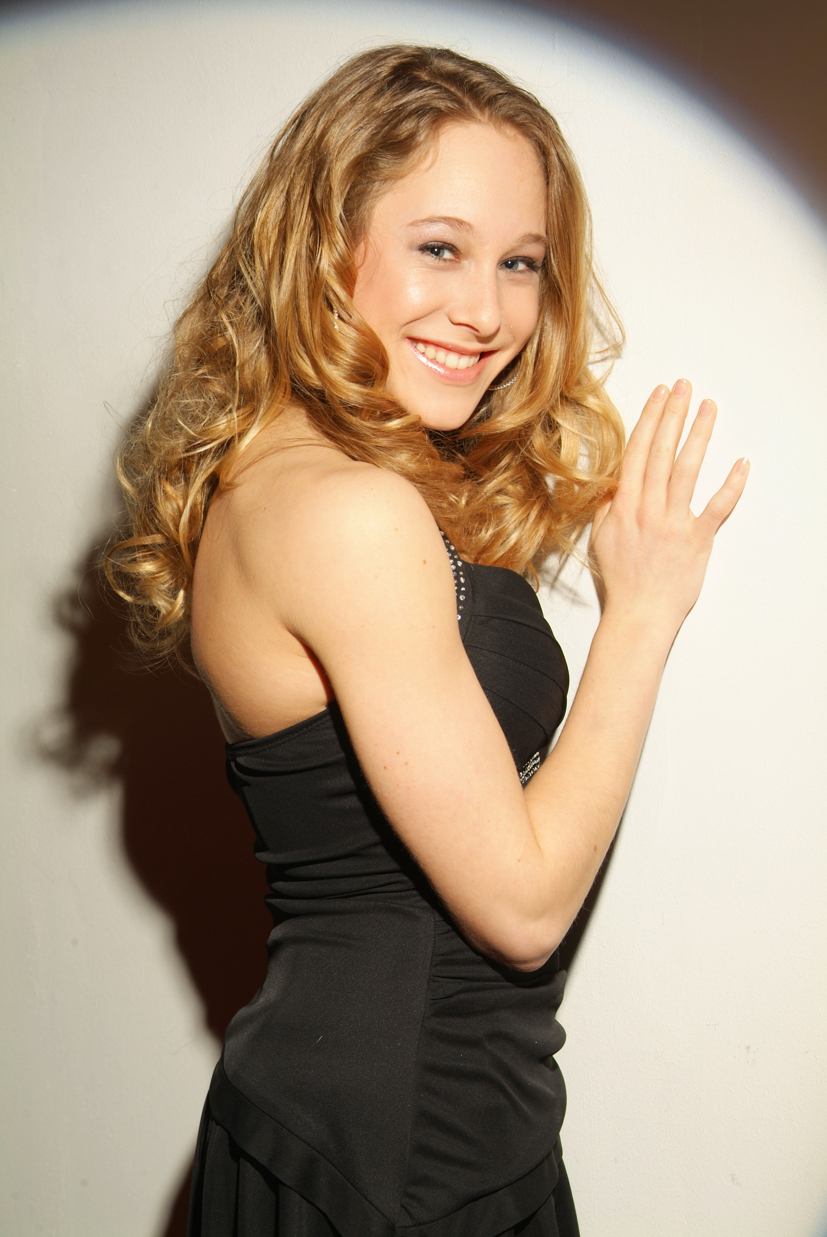 Manouk Gijsman (29 september 1992) is een Nederlands kunstschaatsster.